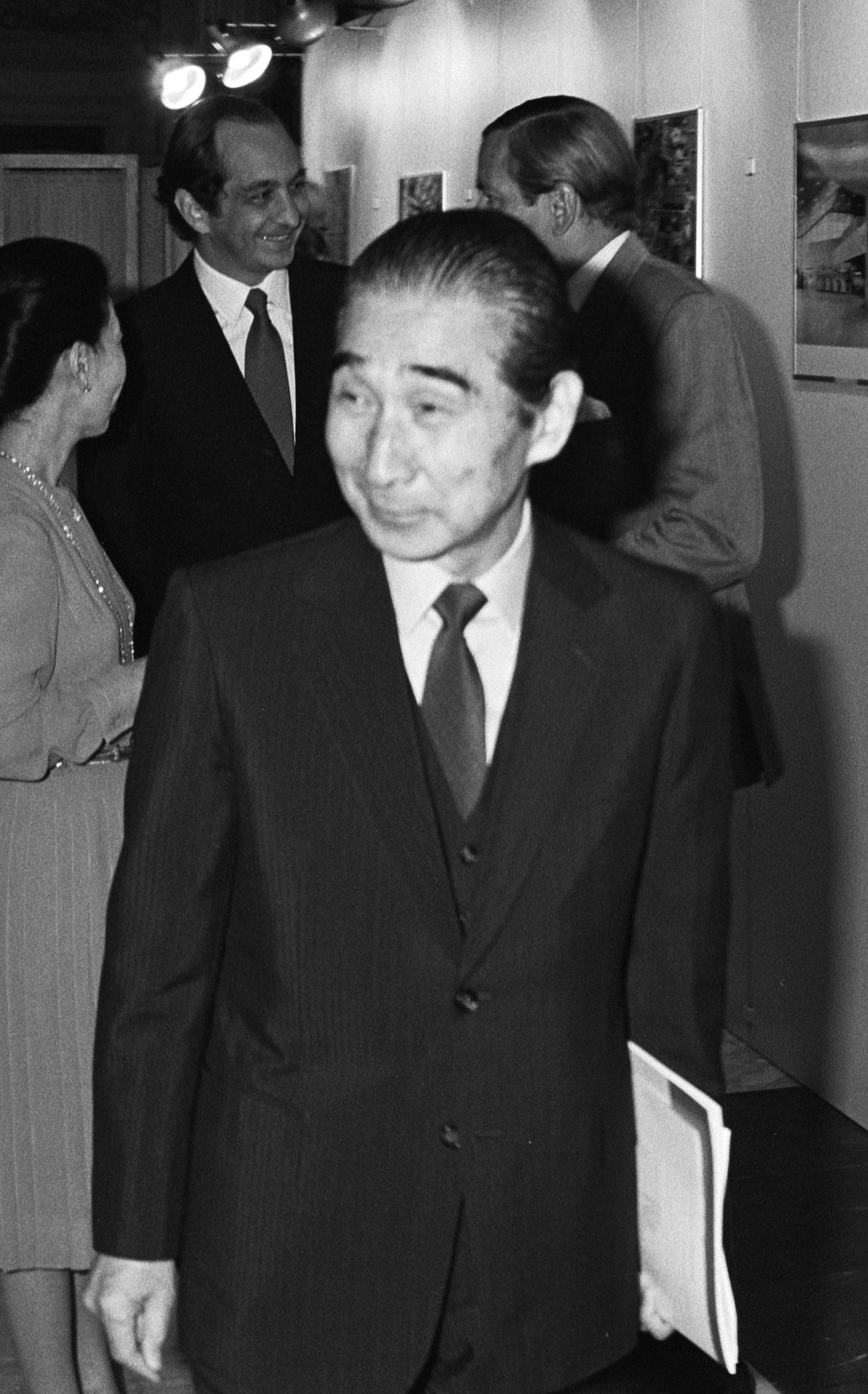 Beatrix en Claus ontvangen de bekende Japanse architect professor Kenzo Tange in het Paleis op de Dam